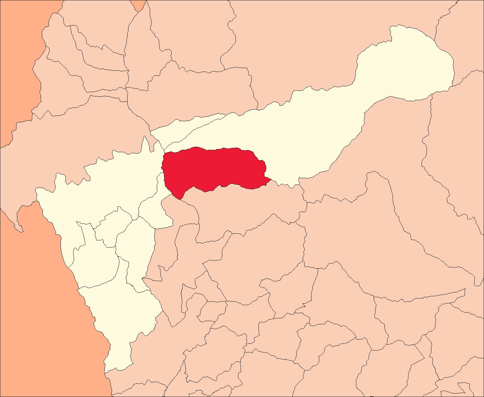 Ubicación del distrito de Chuquis.